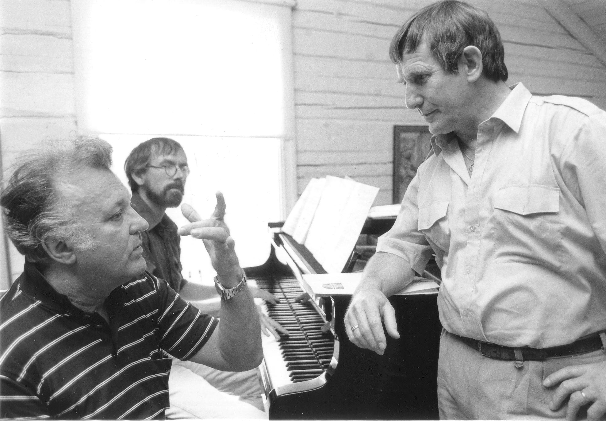 Caj Ehrstedt (oik.) keskustelee tulkinnoista Nicolai Geddan kanssa Korsholman musiikkijuhlilla 1987.